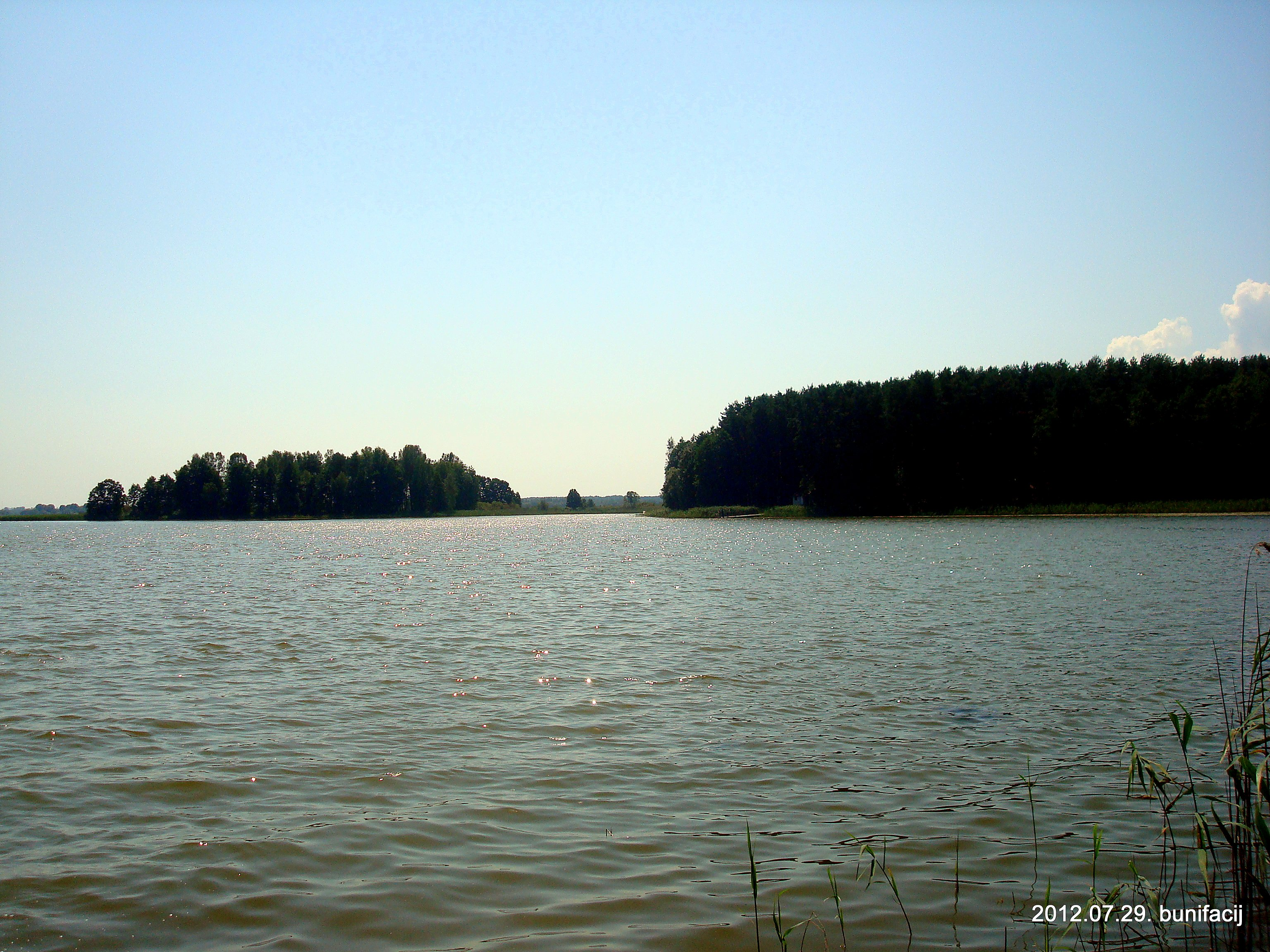 Озеро Яново